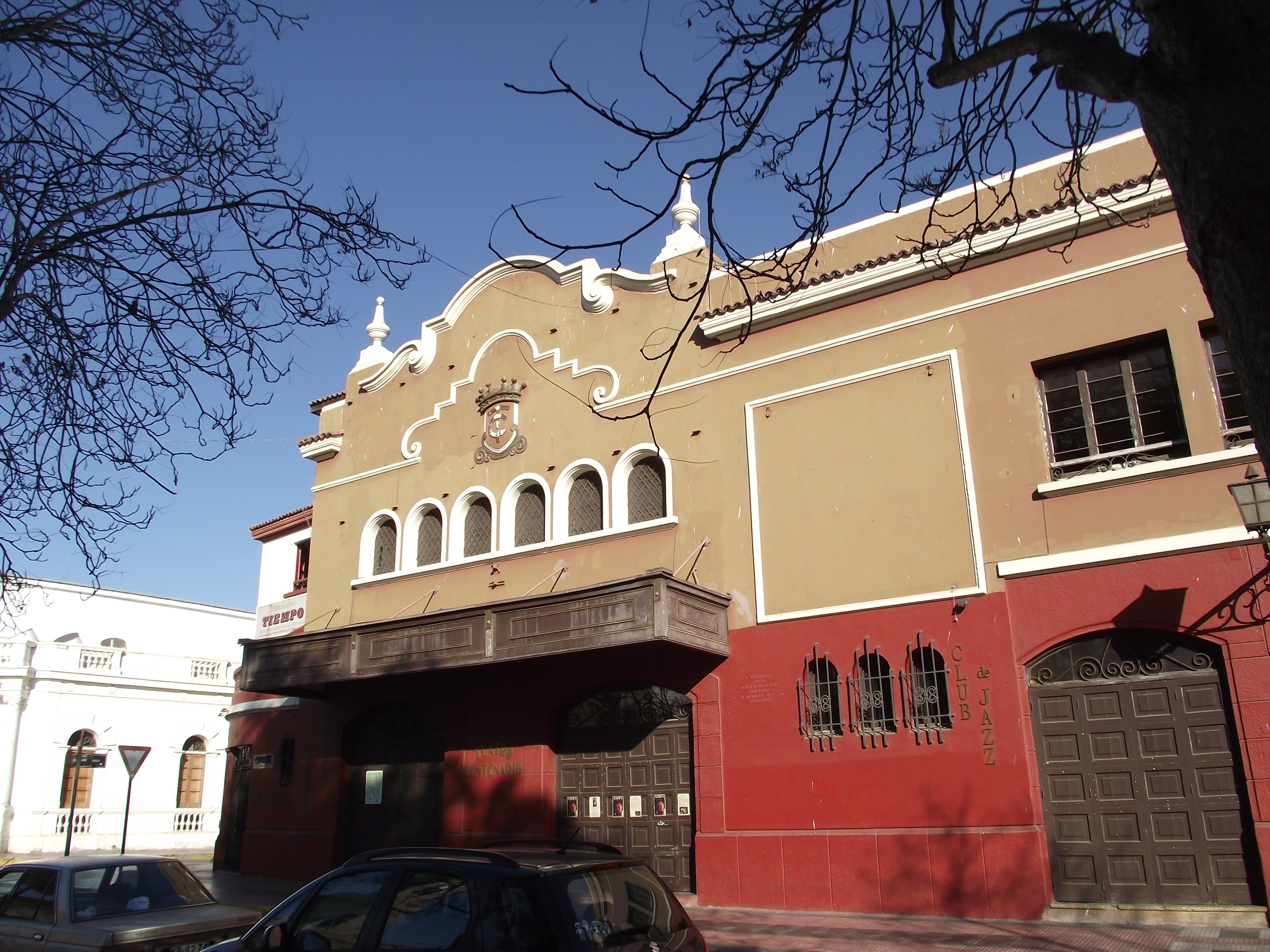 Ex Cine Centenario de La Serena.